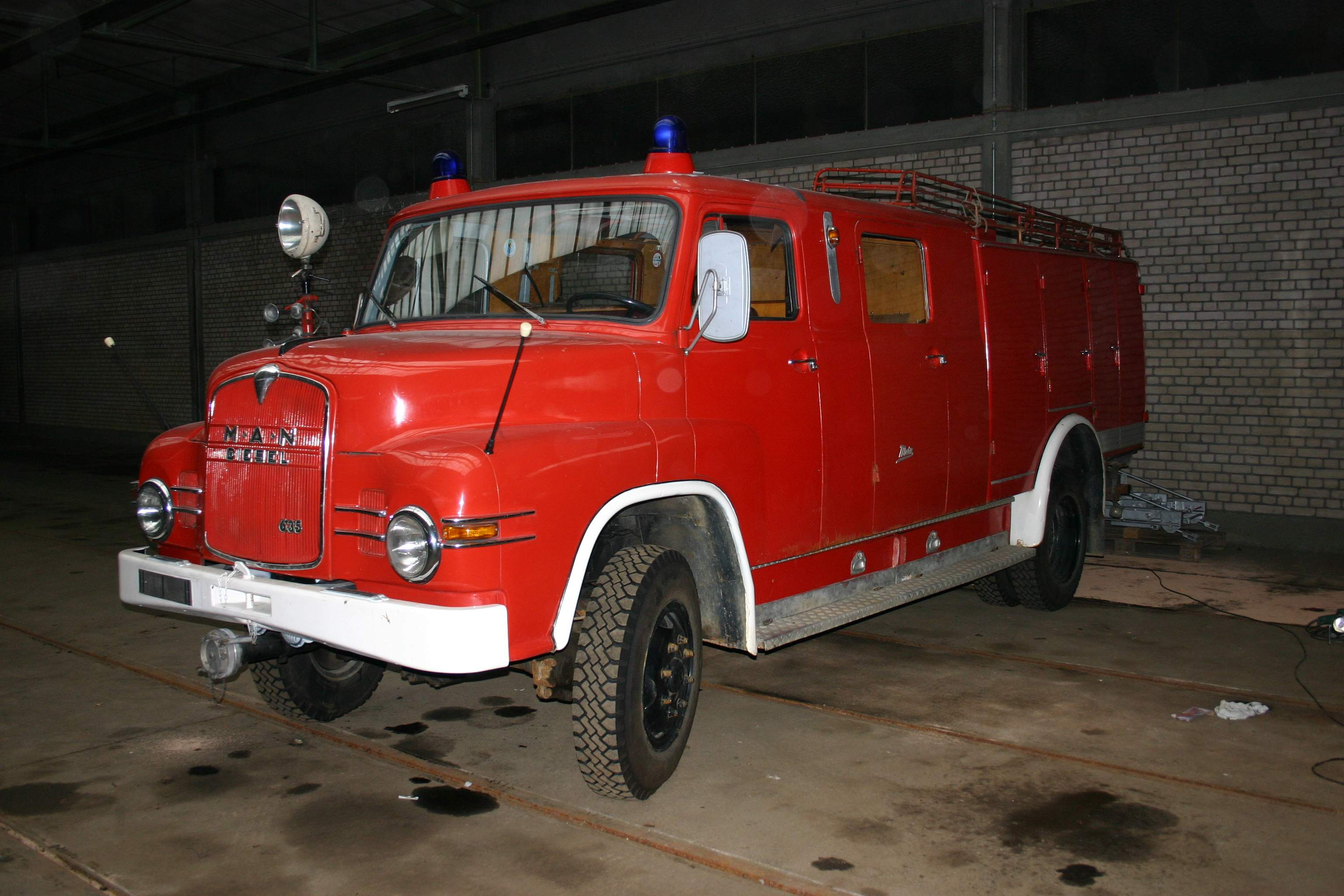 Löschgruppenfahrzeug LF 16 (ehemals FFW-Alfalter, Berufsfeuerwehr Nürnberg)